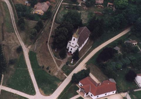 Gálosfa, Hungary, aerialphotography. Urunk színeváltozása római katolikus templom